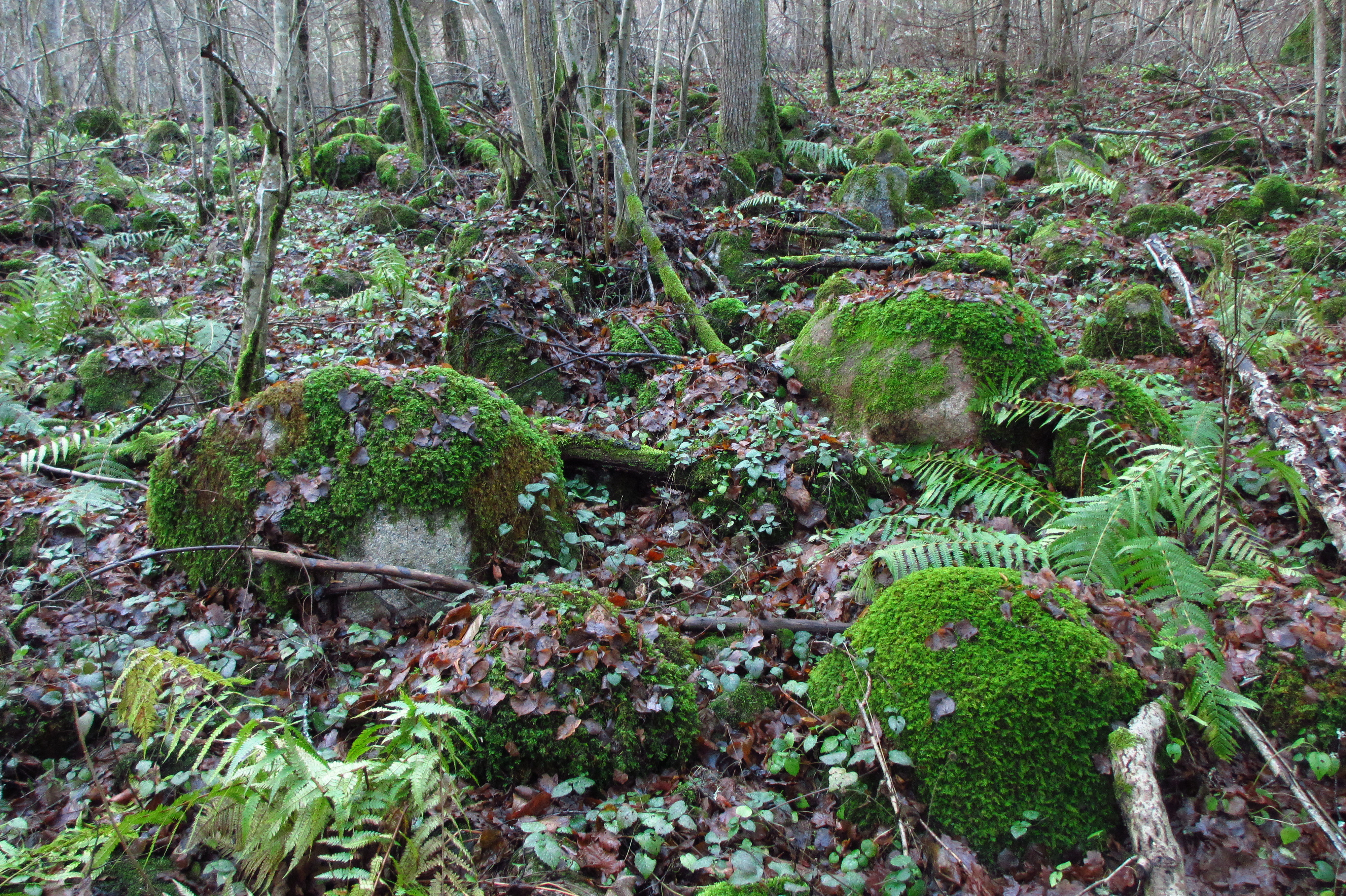 Kivikära Anija MKA